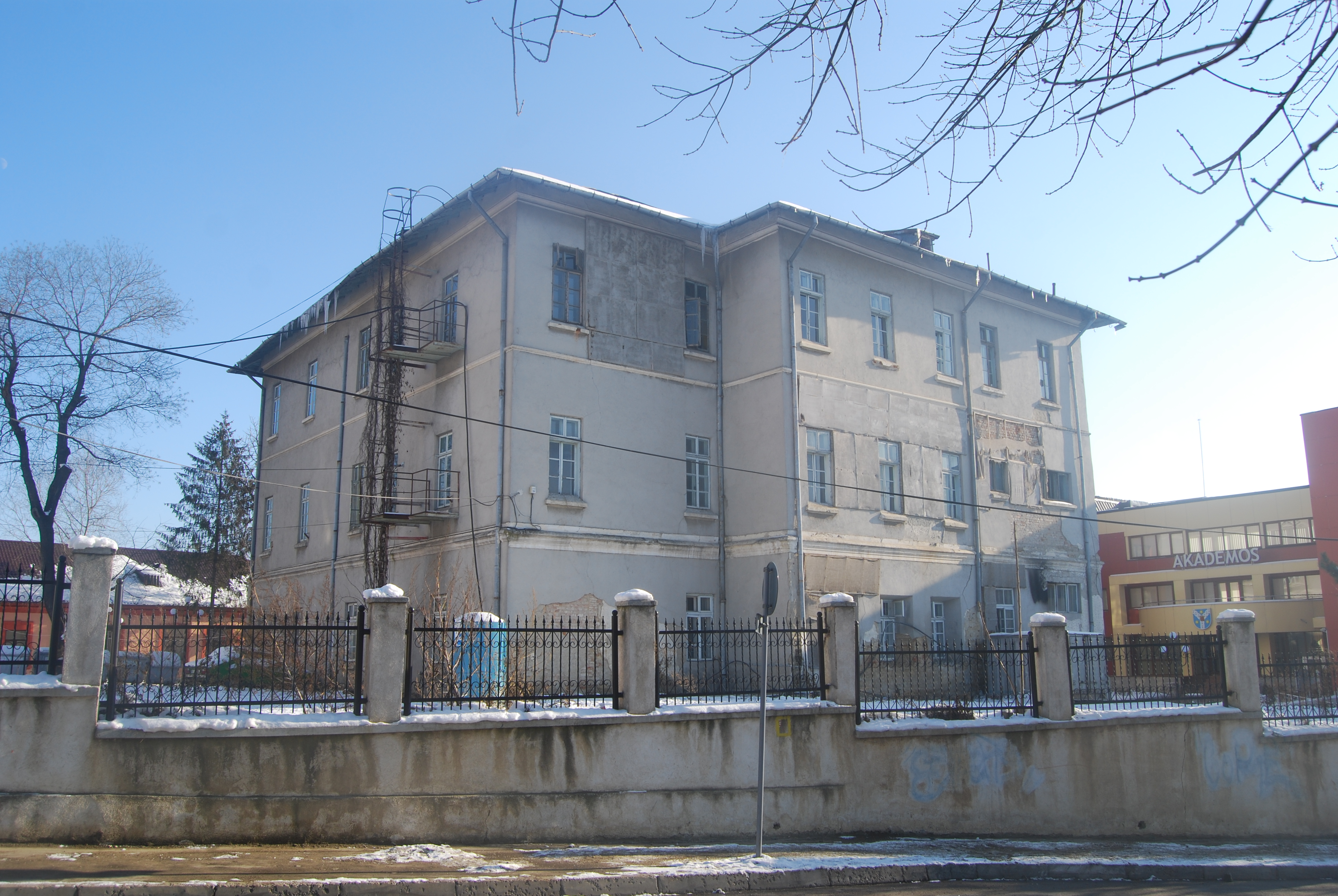 Casa Canano, (prima închisoare), azi Universitatea "Al. I. Cuza"